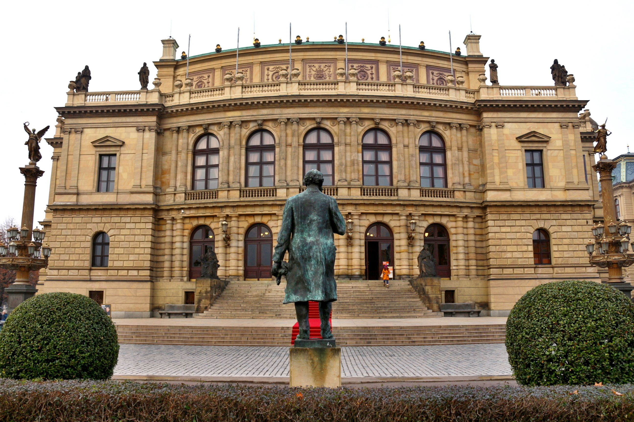 Rudolfinum